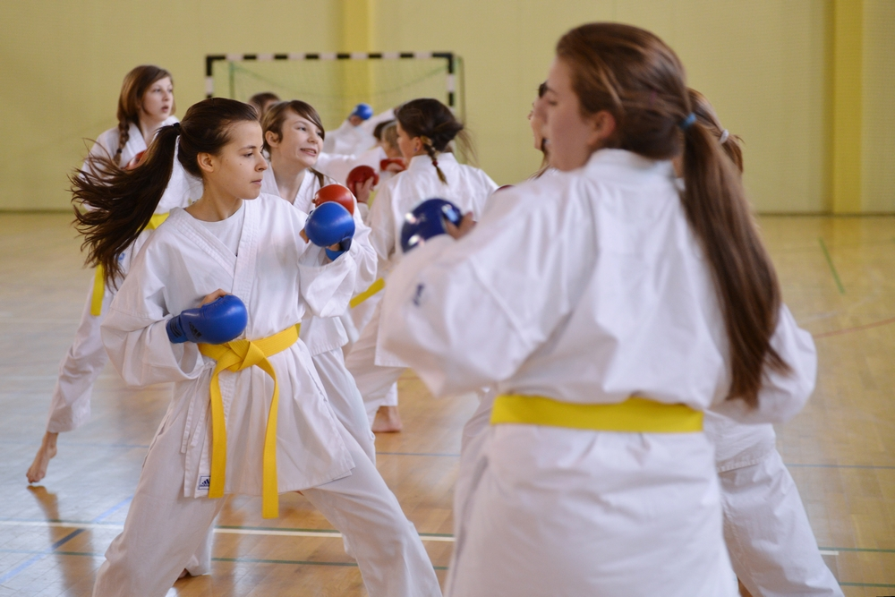 Kumulacja Aktywności - grupa Macieja Jędruszka na zajęciach karate shotokan